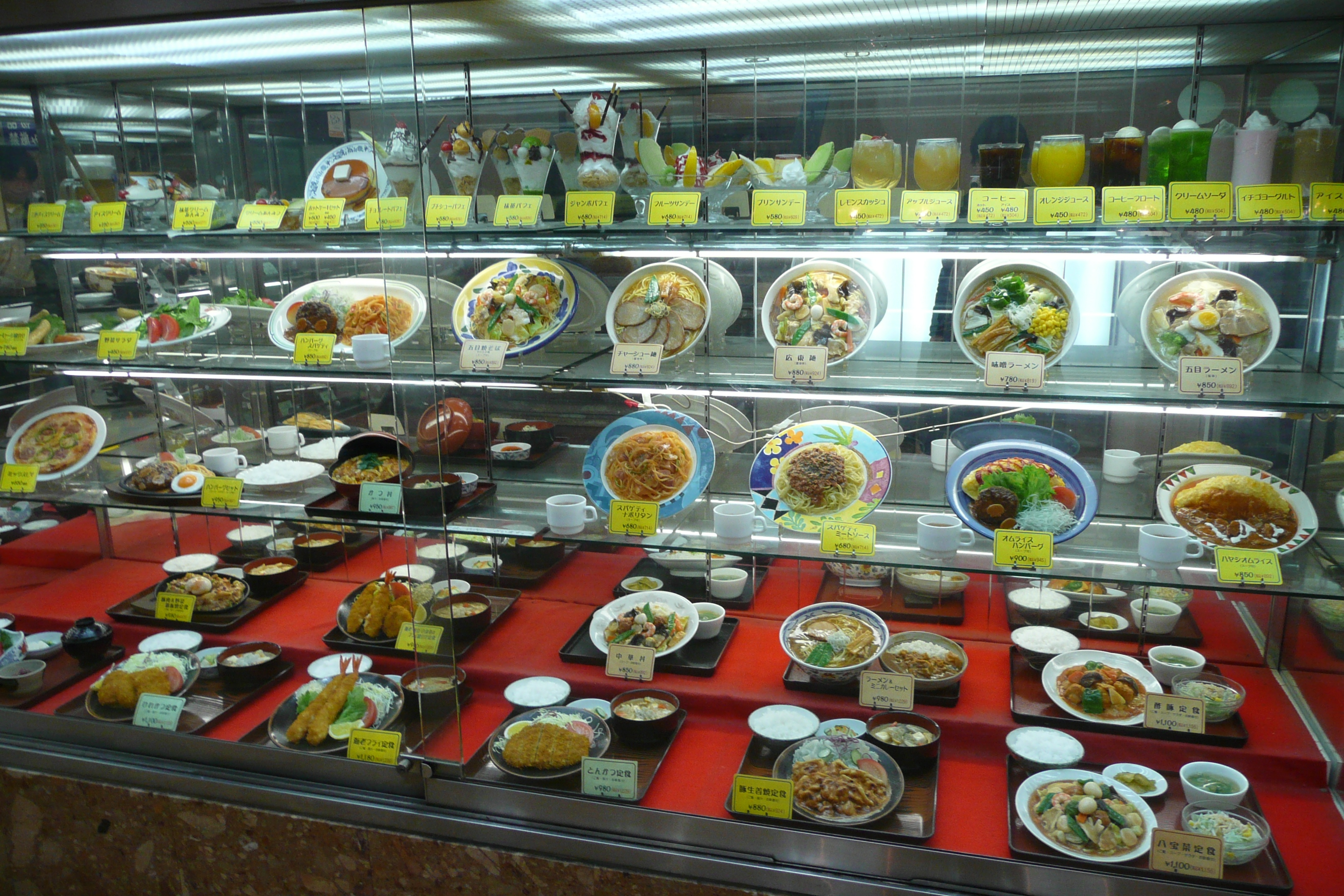 在りし日の老舗レストラン聚楽台（東京都台東区上野公園）。2008年まで営業していた。